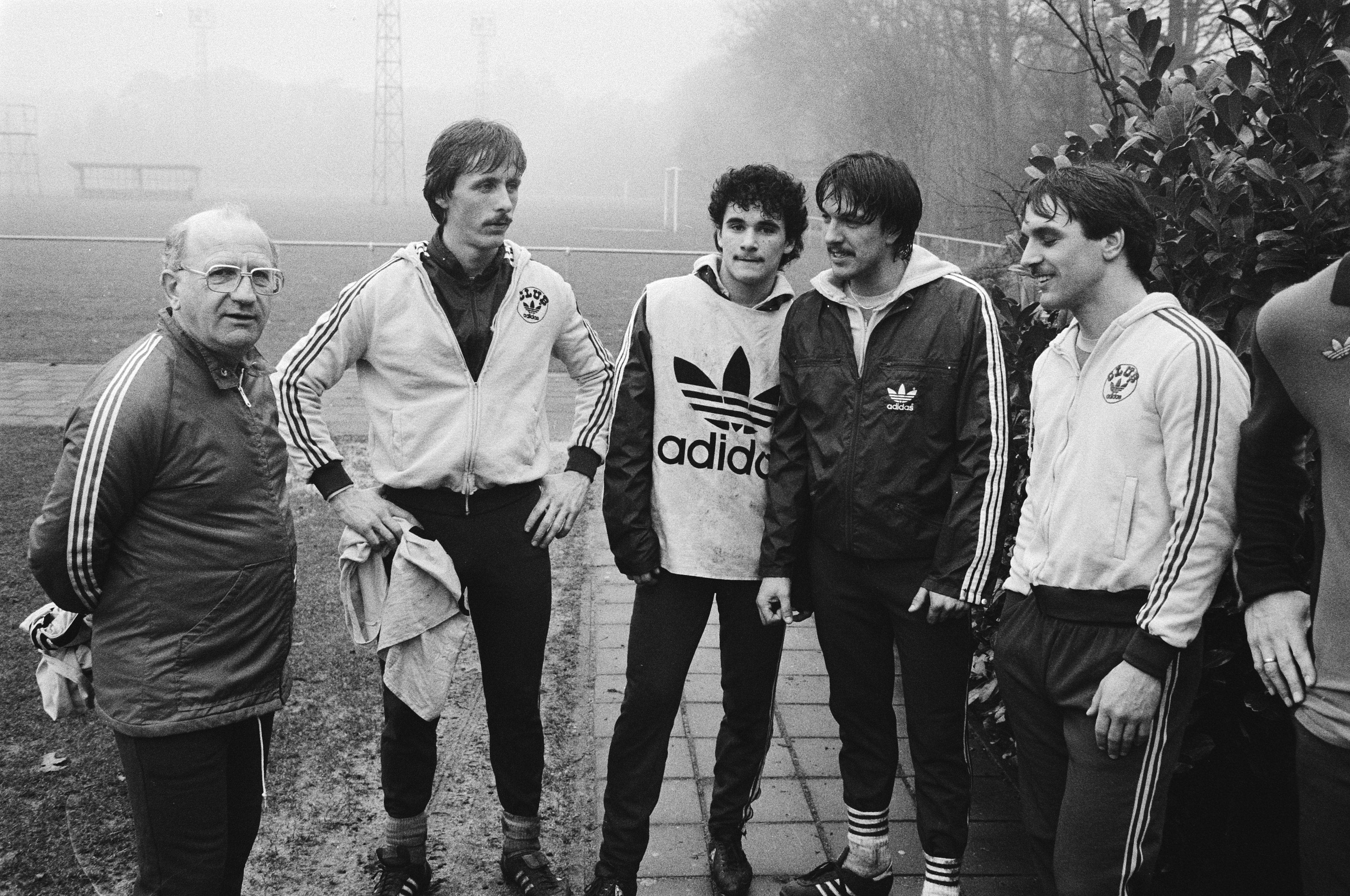 Collectie / Archief : Fotocollectie Anefo Reportage / Serie : Training van het Nederlands elftal in Zeist Beschrijving : V.l.n.r. bondscoach Rijvers, Koolhof, Gerald Vanenburg , Ben Wijnstekers en Edo Ophof Datum : 25 januari 1983 Locatie : Utrecht, Zeist Trefwoorden : groepsportretten, sport, trainers, voetbal Persoonsnaam : Koolhof, Jurrie, Ophof, Edo, Rijvers, Kees, Vanenburg, Gerald, Wijnstekers, Ben Fotograaf : Antonisse, Marcel / Anefo Auteursrechthebbende : Nationaal Archief Materiaalsoort : Negatief (zwart/wit) Nummer archiefinventaris : bekijk toegang 2.24.01.05 Bestanddeelnummer : 932-4777